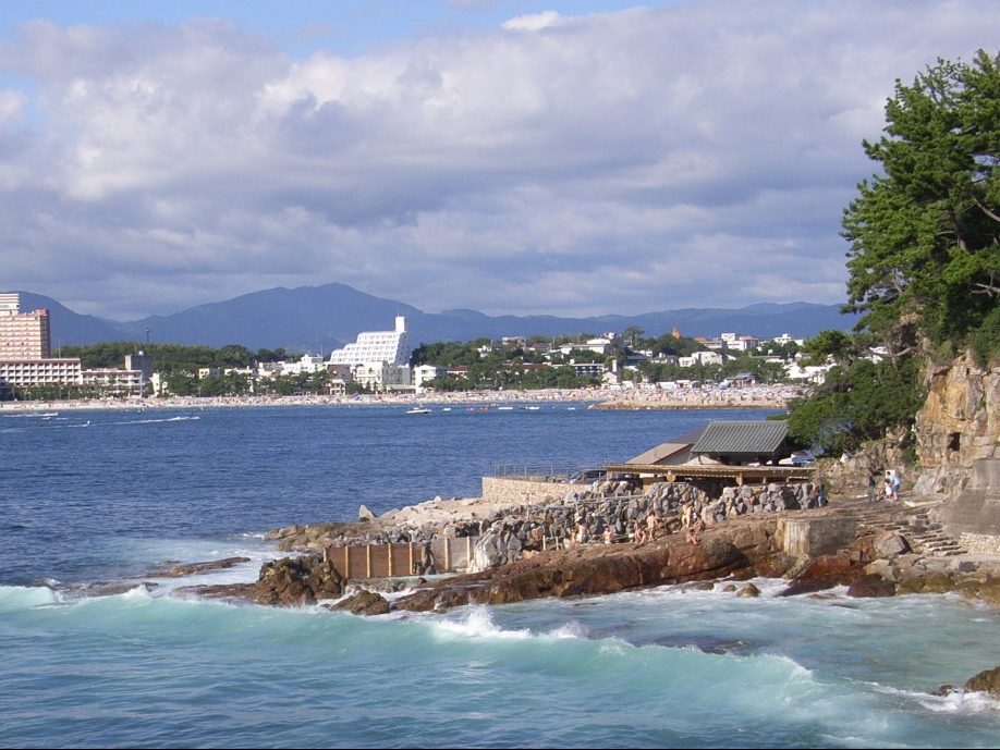 南紀白浜温泉の崎の湯